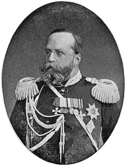 генерал Миркович, Михаил Фёдорович